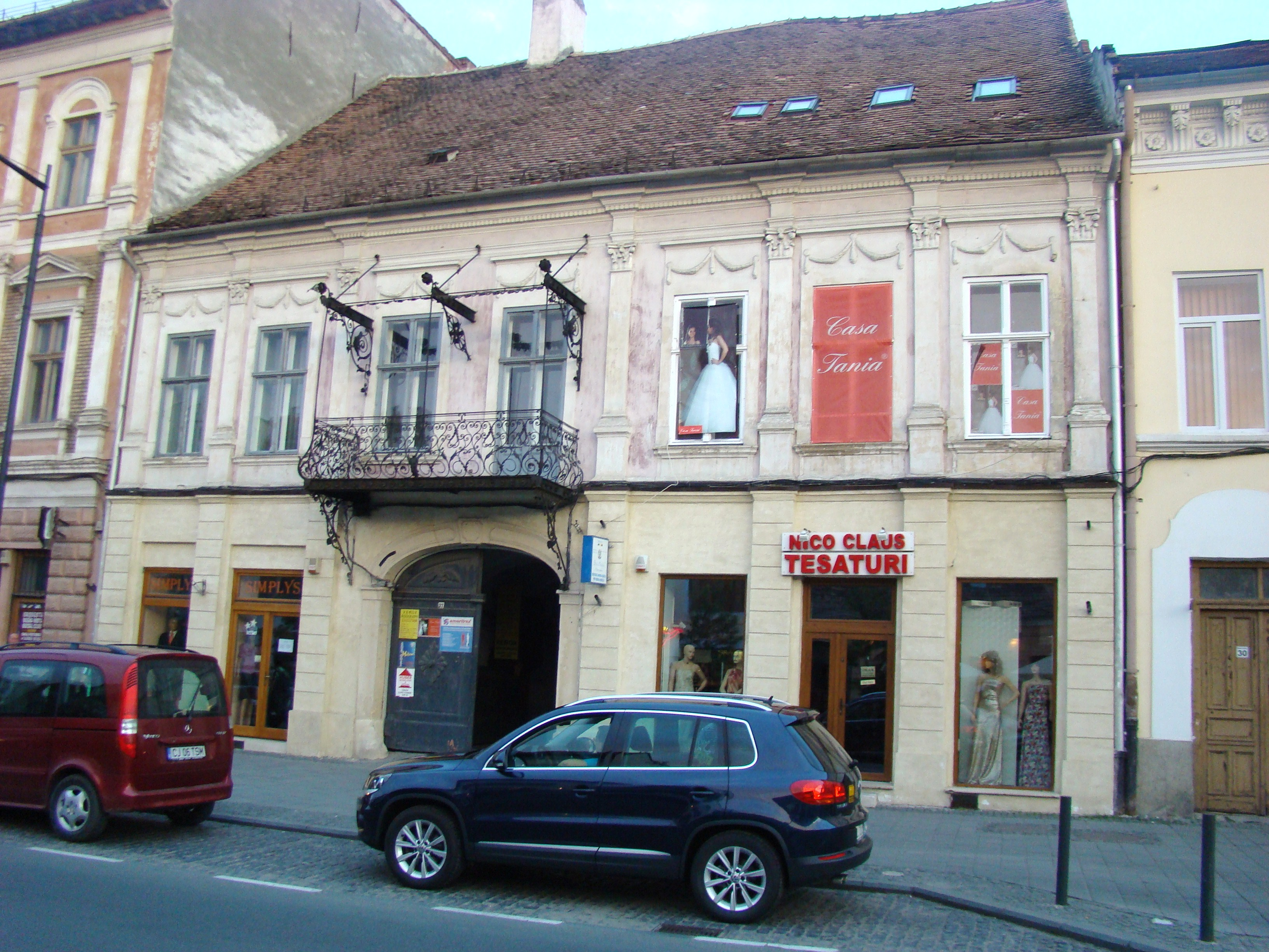 Clădire monument istoric, Bd.Eroilor, nr. 32 (Casa mică Banffy)